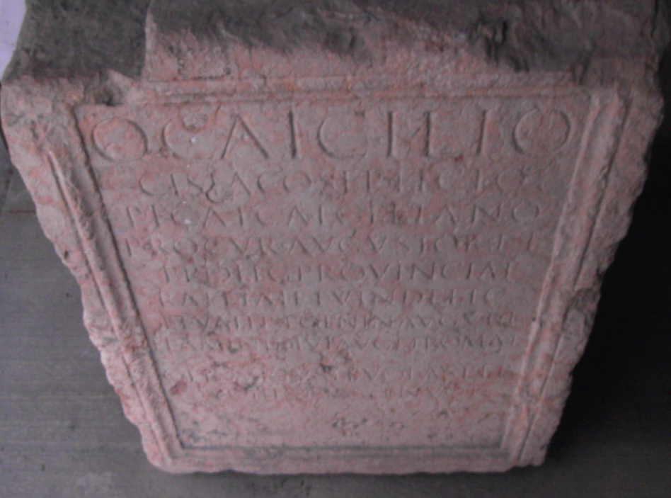 CIL V, 3936 Lápida que muestra el procurador de Recia